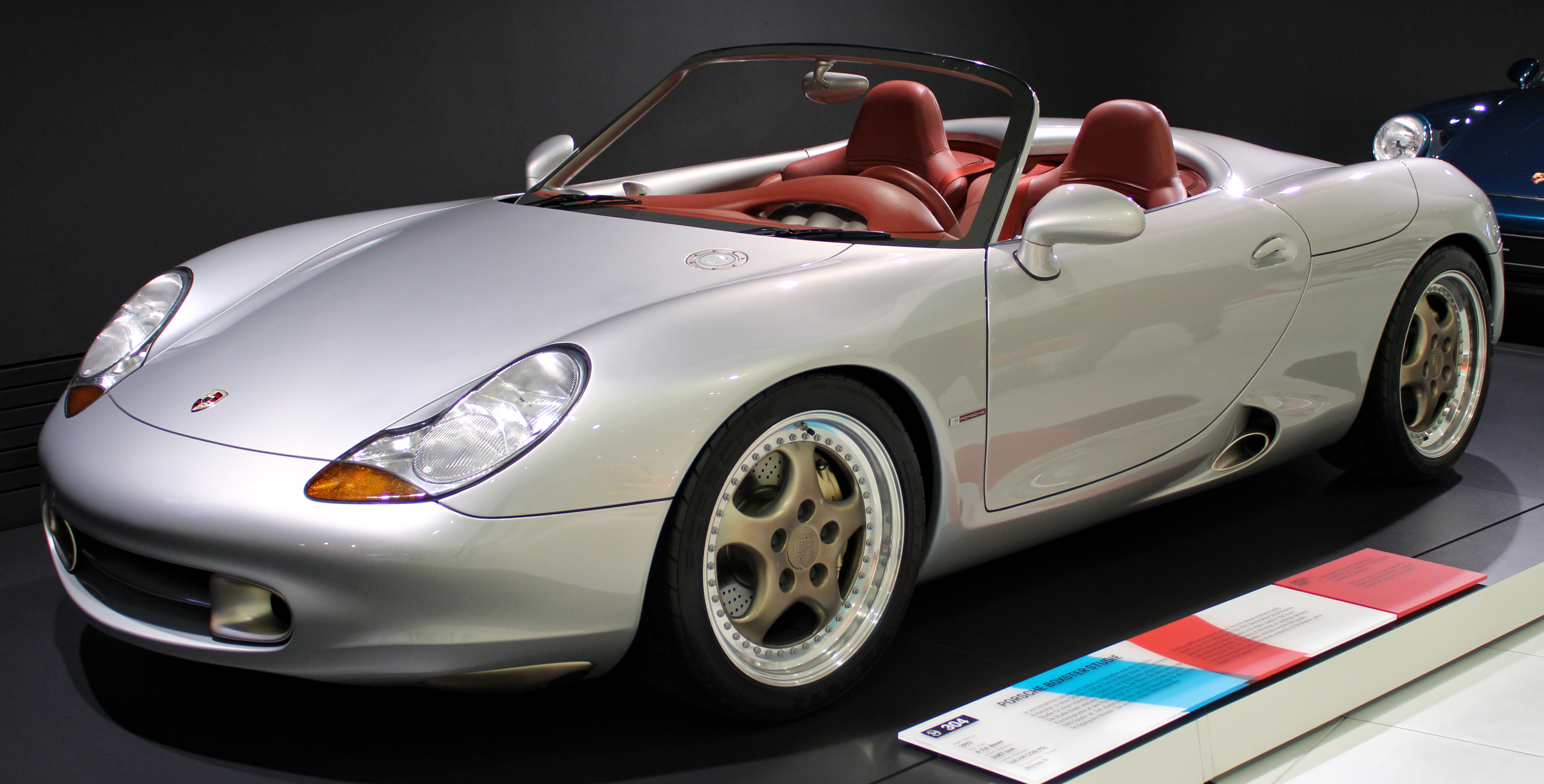 Porsche Boxster Concept im Porsche-Museum 2018